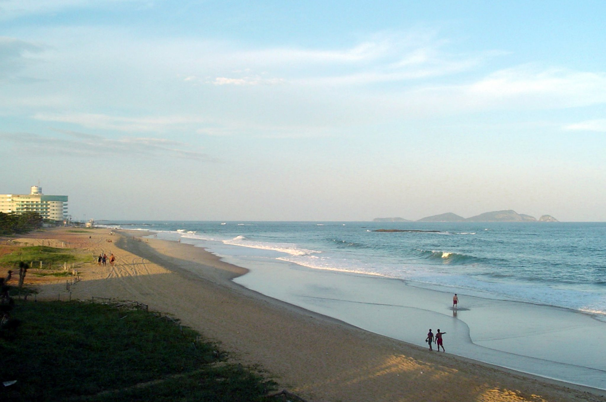 Praia do Pecado - Macaé, Rio de Janeiro, Brazil